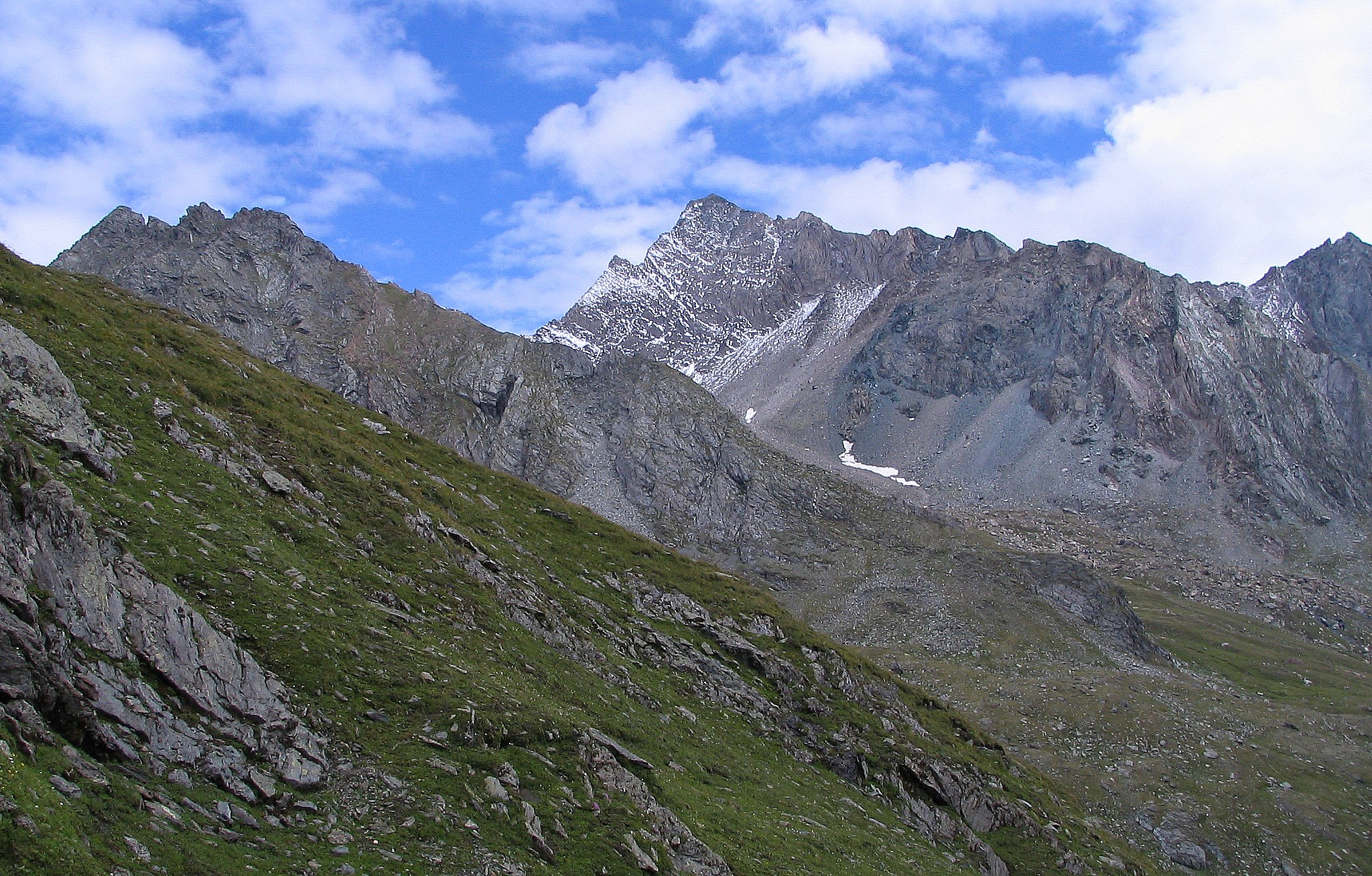 Hoher Eichham z górnego piętra doliny Timmeltal